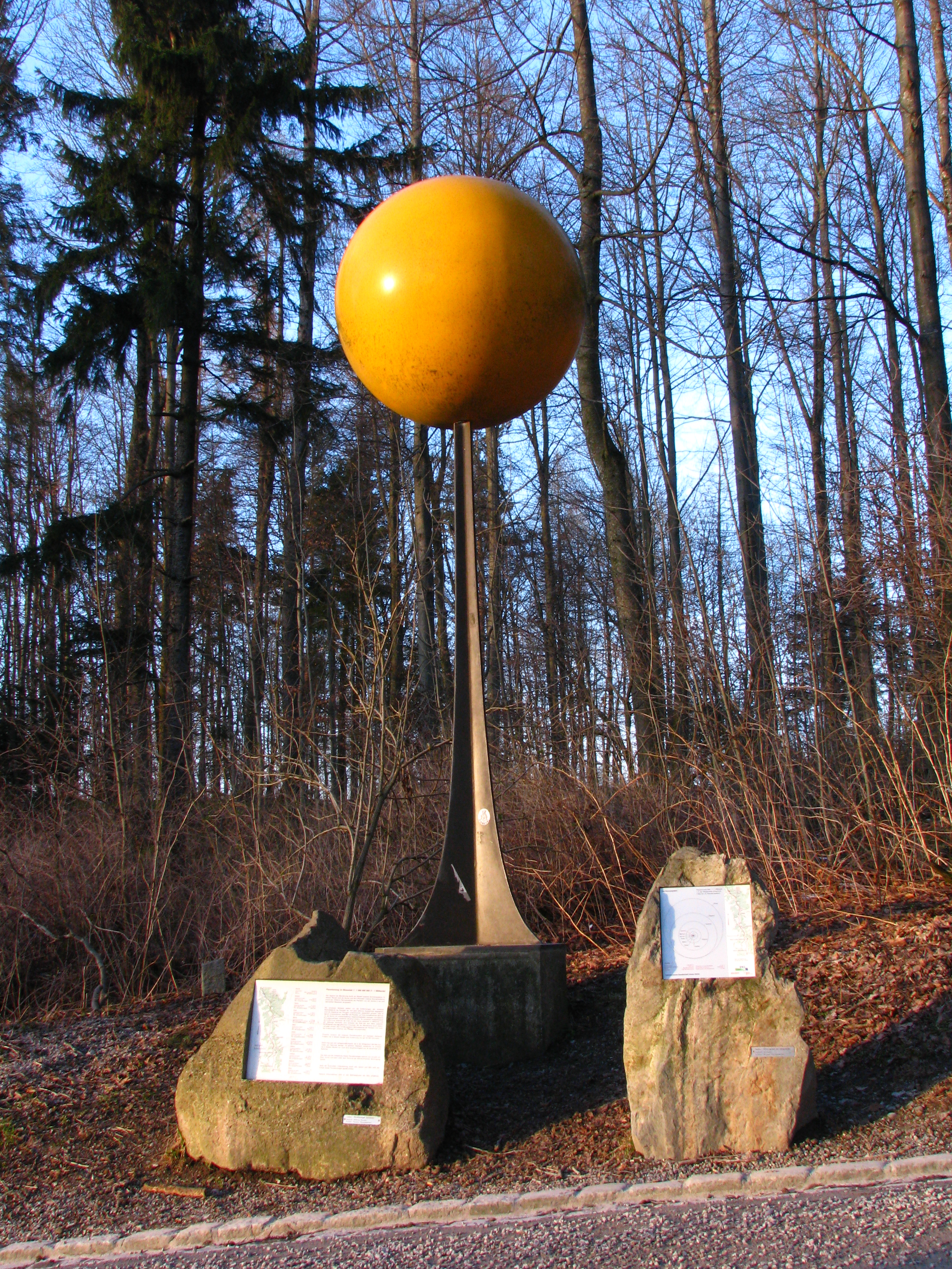 Planetenweg Uetliberg-Felsenegg - Sun nearby Uetliberg Uto Kulm